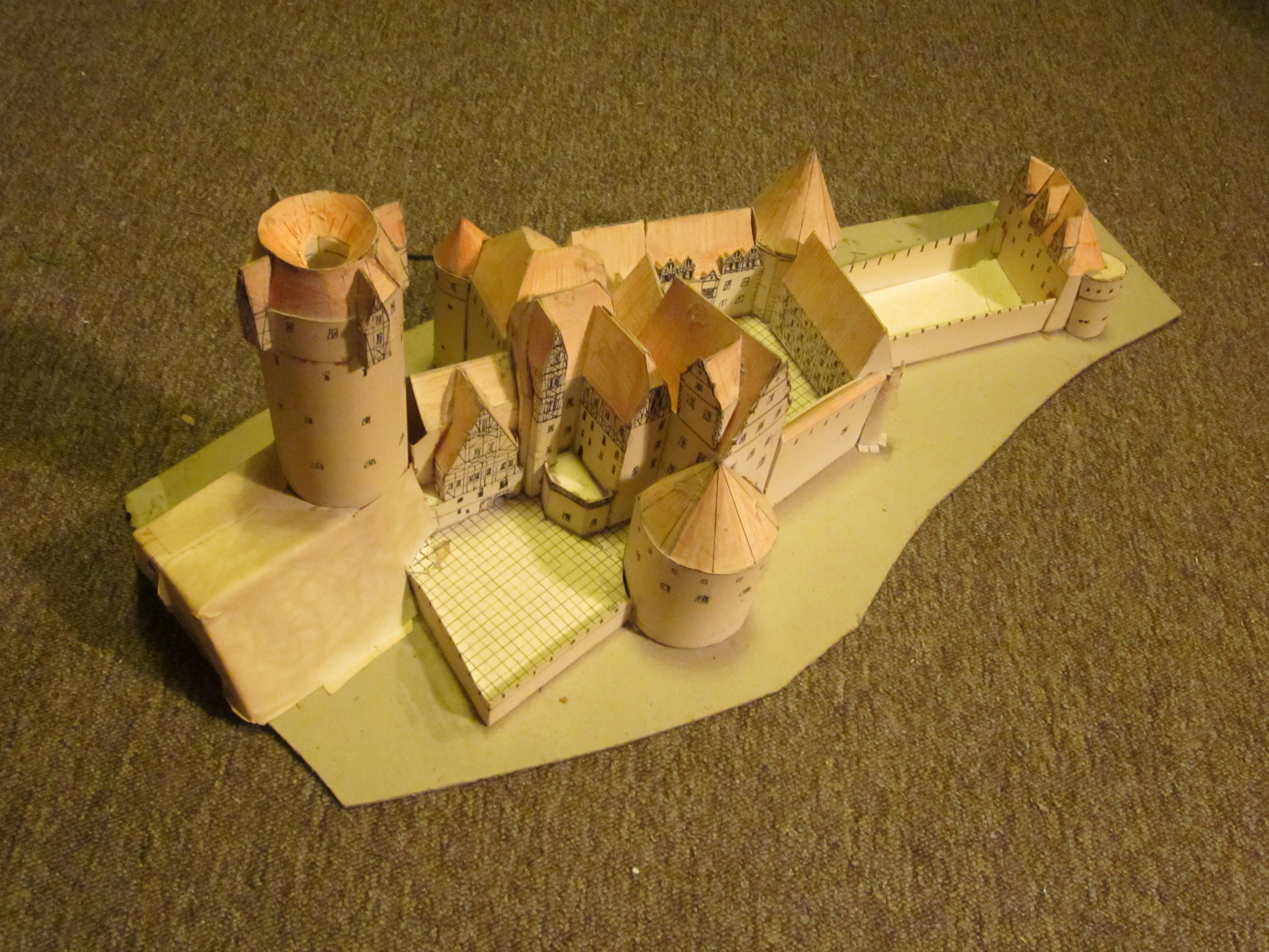 Modell der Hardenburg bei Bad Dürkheim (gebastelt von anro, ca. 1990)